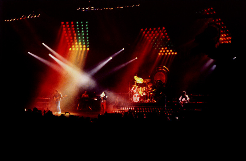 Queen, Drammenshallen, Norway